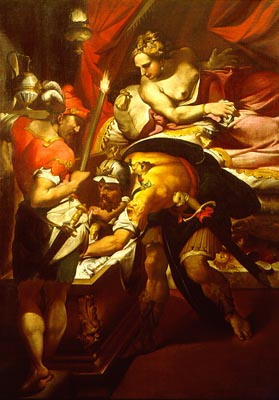 Ilustración de la historia del robo de la vellocino de oro